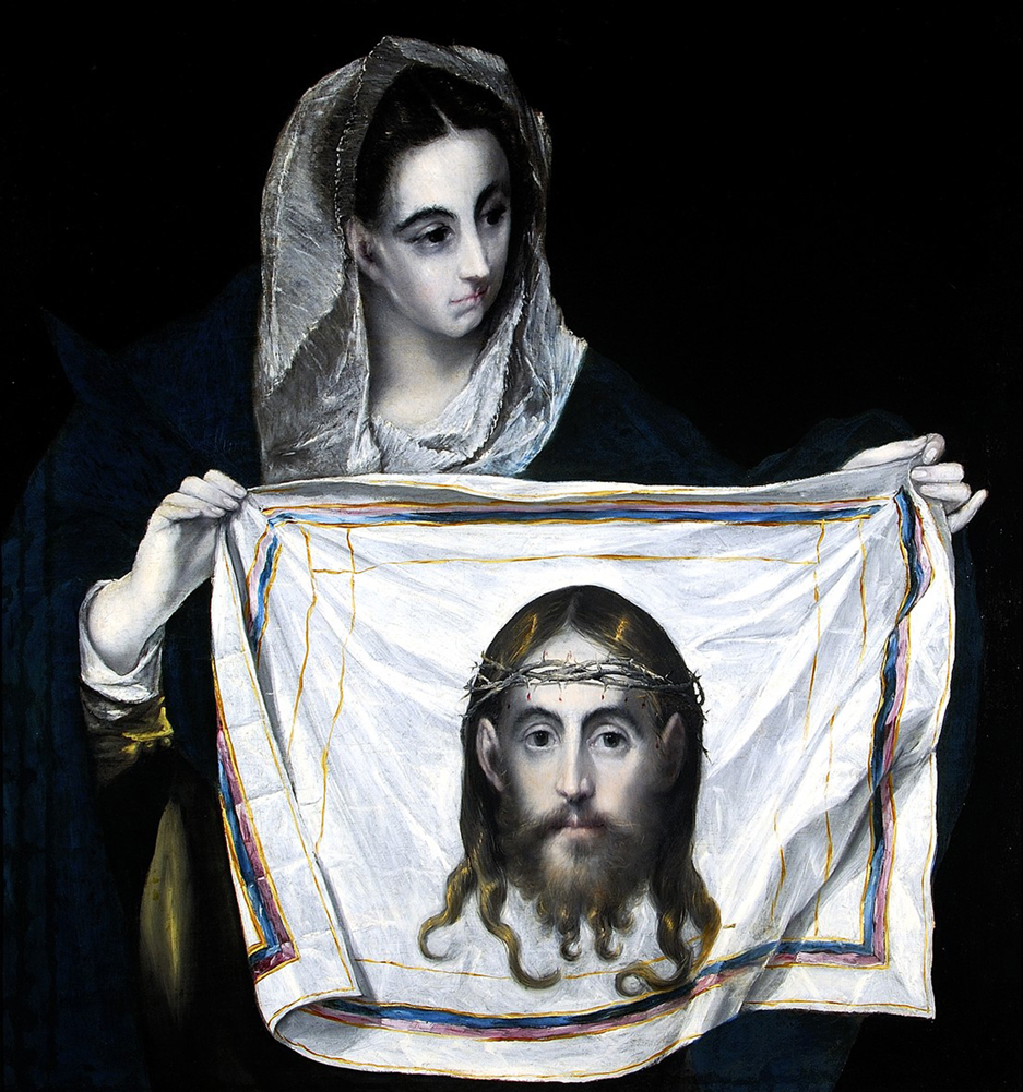 La obra representa a Santa Verónica contemplando y mostrando el paño de la Santa Faz, en el que aparece el rostro de Jesucristo.